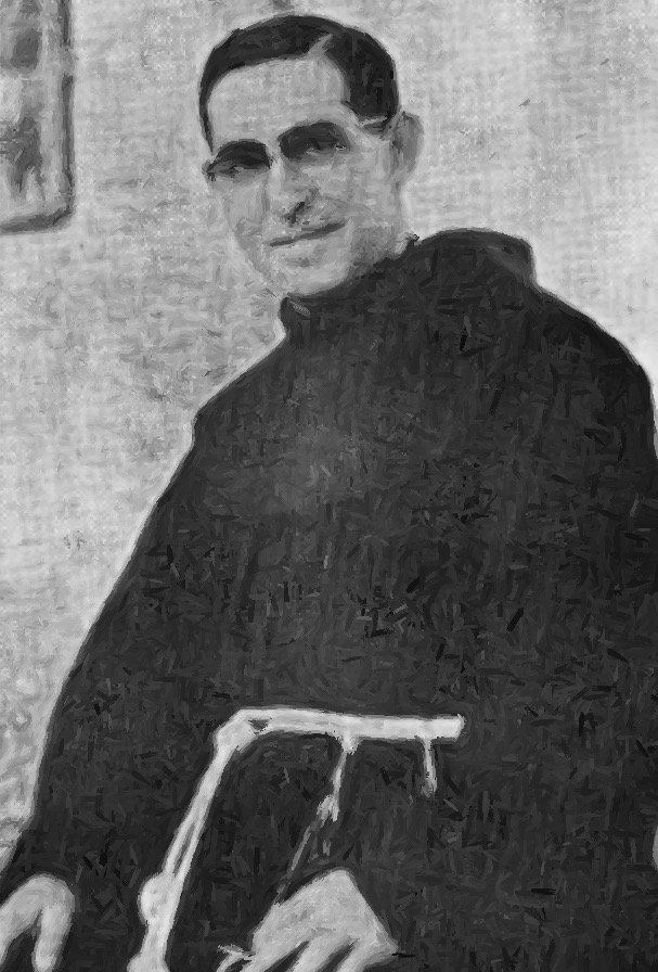 Fray Miguel Murcia, sacerdote franciscano que estuvo a cargo del templo de La Recolección.